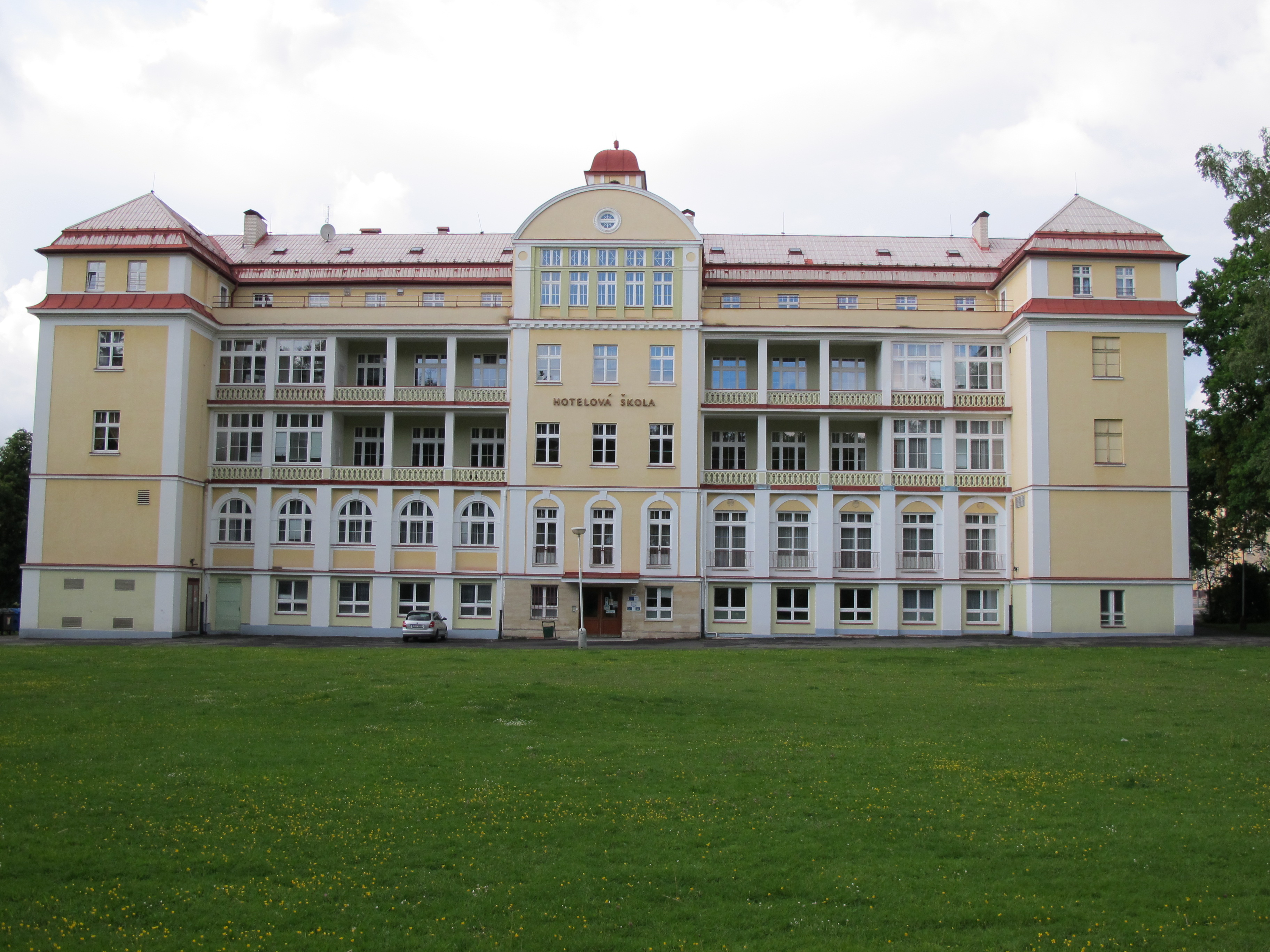 Hotelová škola v Mariánských Lázních - zadní část This image was acquired during the event Wikiměsto Mariánské Lázně.